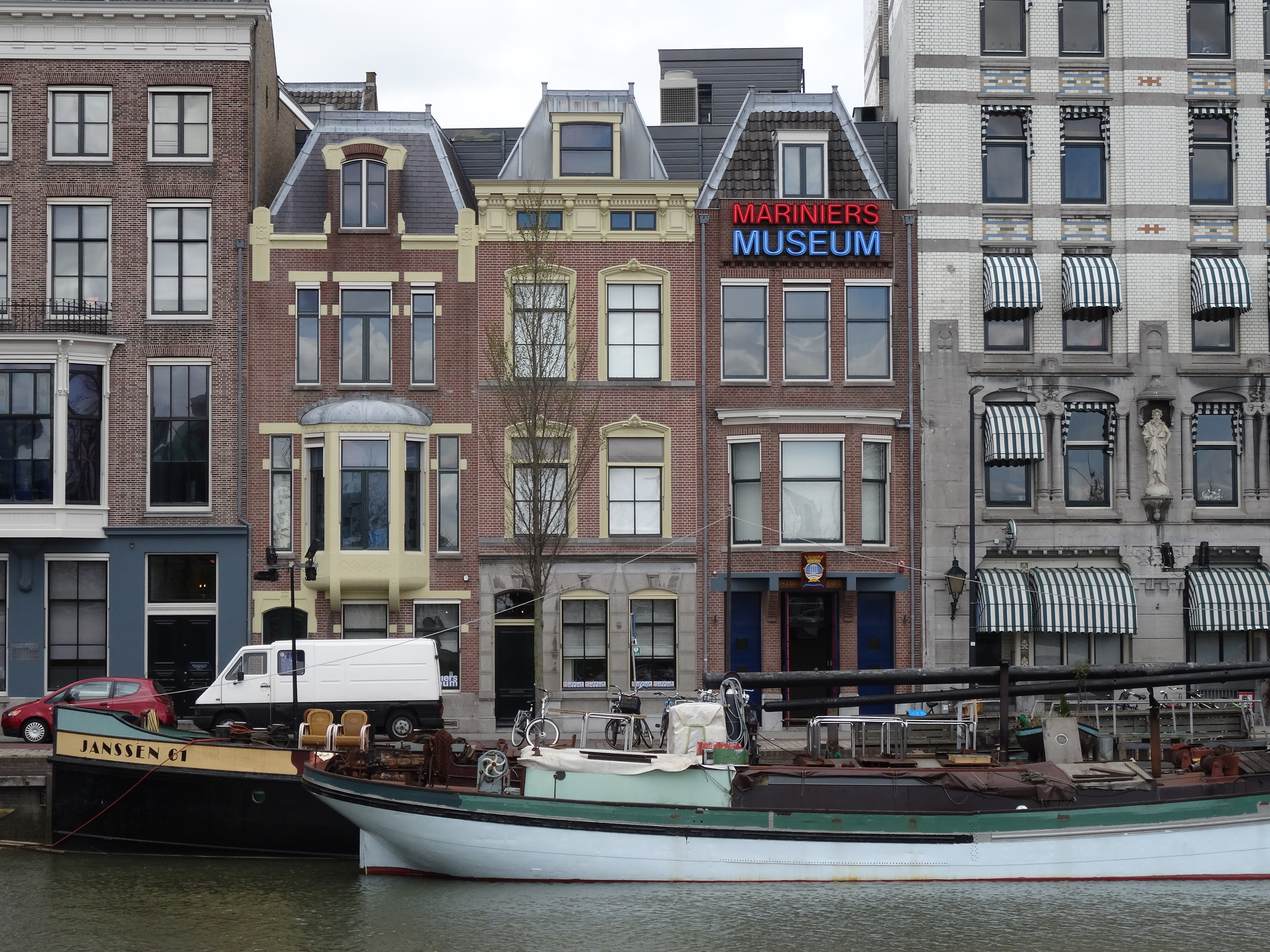 De gebouwen van het Mariniersmuseum naast het Witte Huis in Rotterdam.